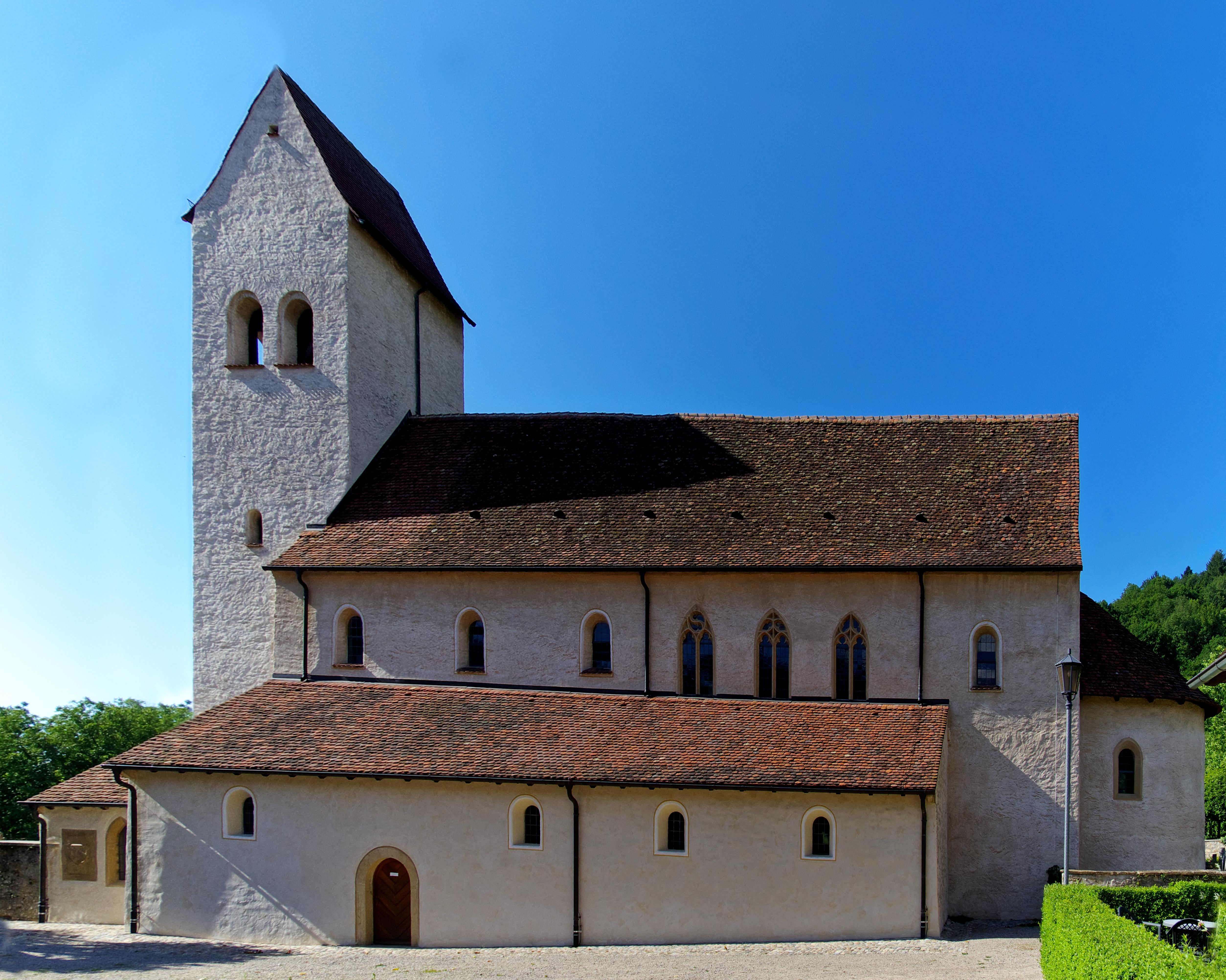 Romanische Kirche St. Cyriak Sulzburg